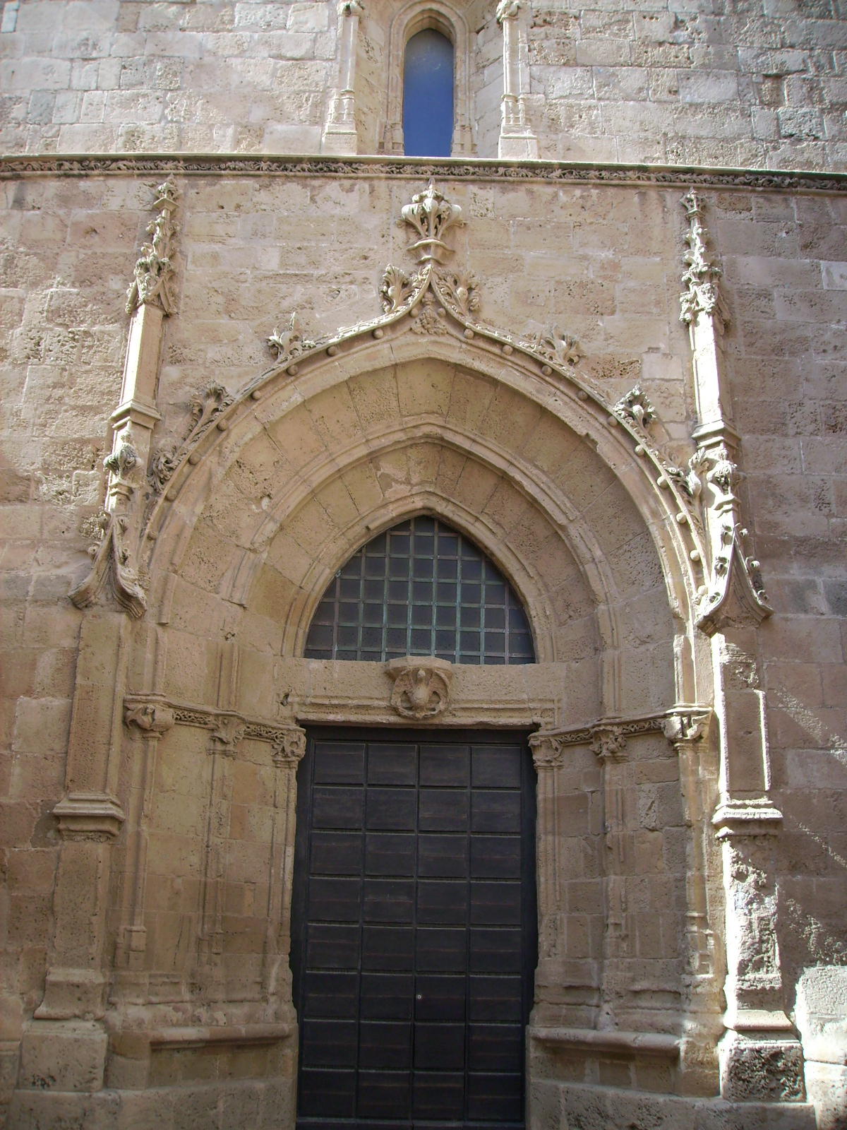 Domportal, Alghero, Sardinien